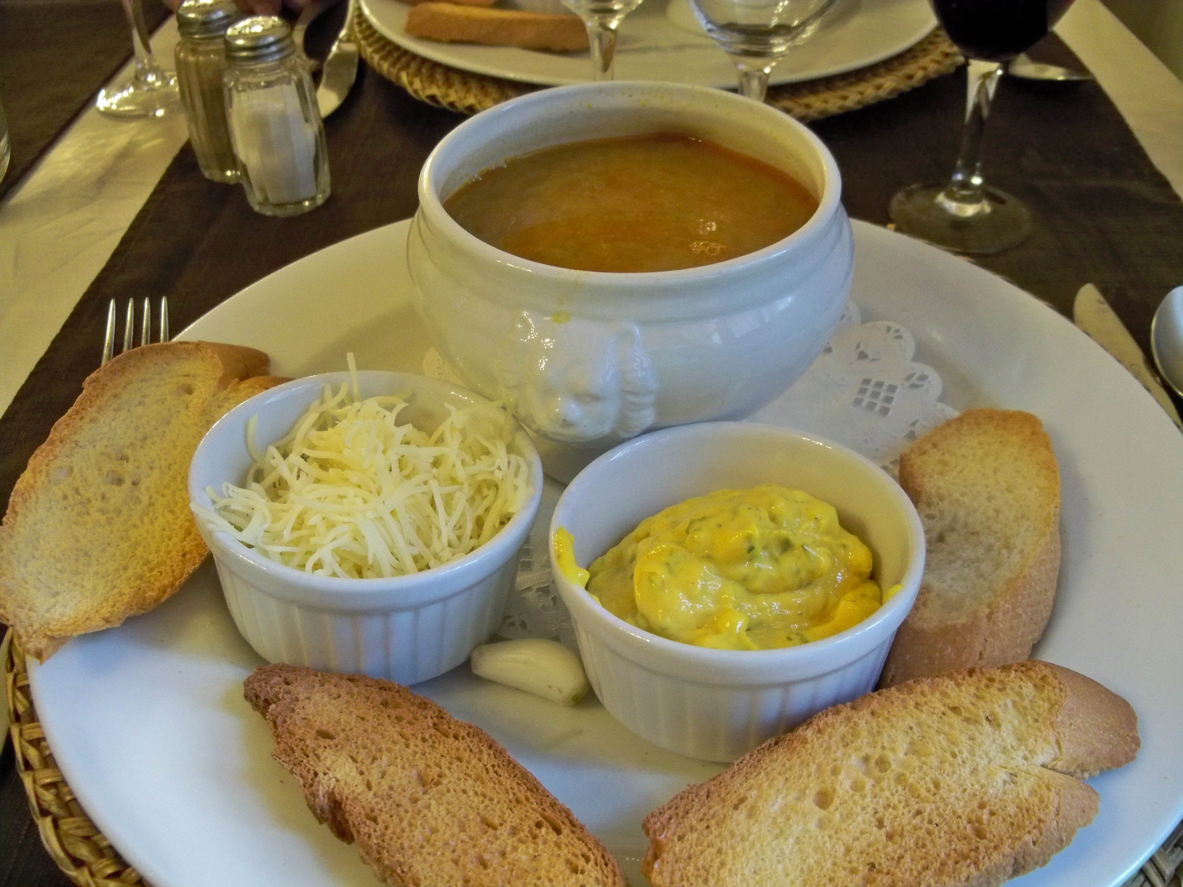 Soupe de poissons de roches